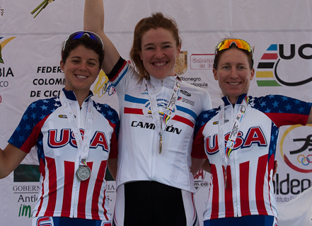 El podio del CRI Damas Campeonato Panamericano de Ciclismo de Ruta. Medellín. 6 de mayo de 2011.